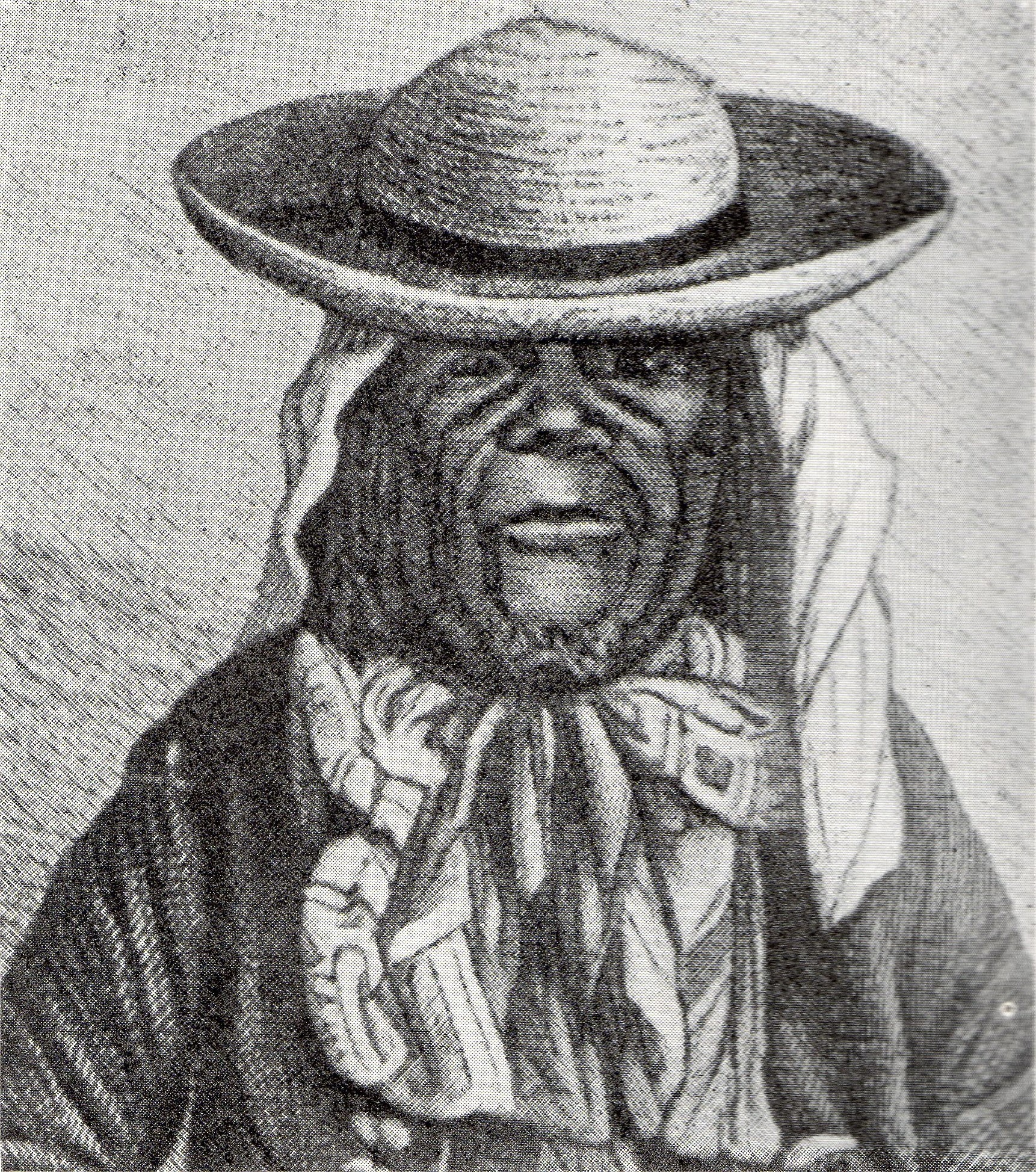 le chef Mwenda M'Siri Ngelengwa Shitambi, aussi appelé Msiri.